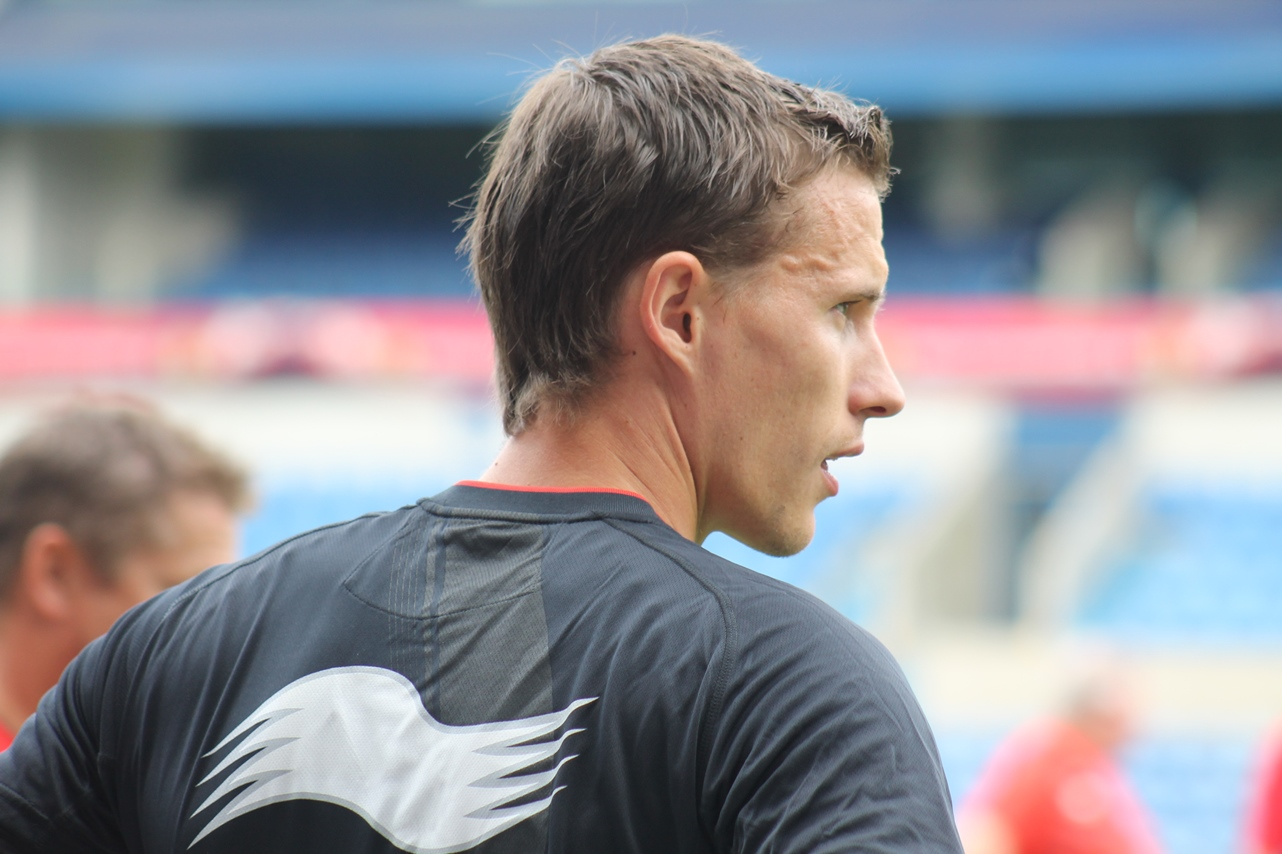 Sammy Bossut lors d'un entrainement des Diables Rouges en stage préparatif à la Coupe du Monde 2014 au Brésil